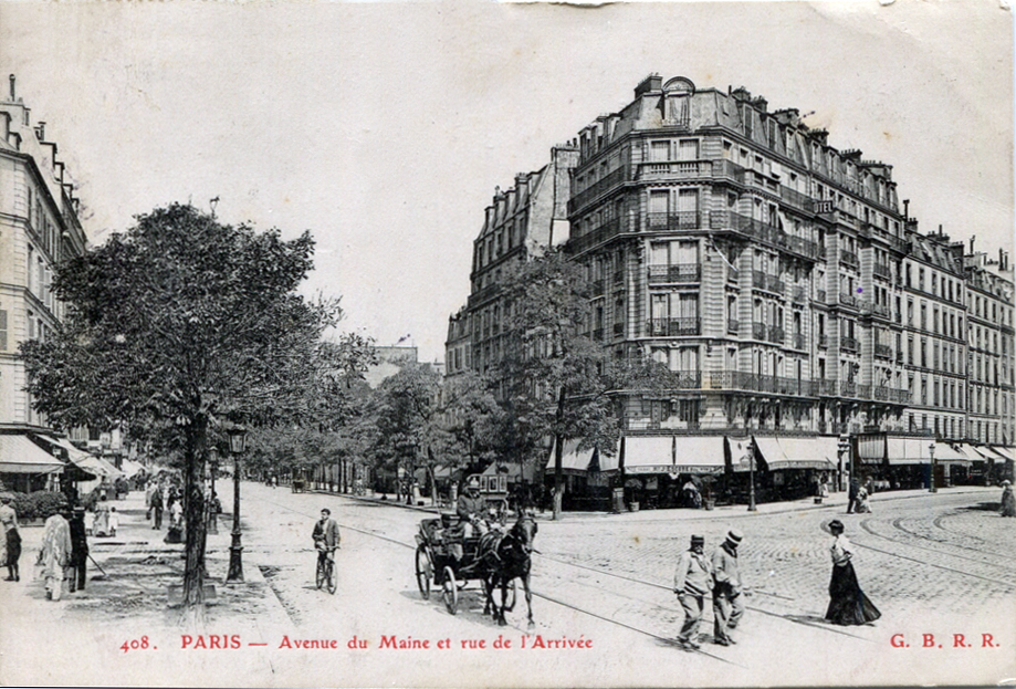 Paris, ca.1900, rue de l'Arivée, Avenue du Maine, Montparnasse.